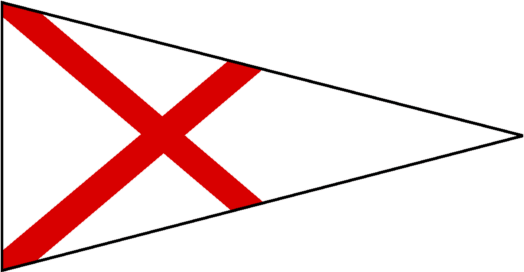 Der Stander (die Clubflagge) des Segel-Club "Ahoi" aus Berlin: Rotes liegendes Kreuz auf weißem Grund.